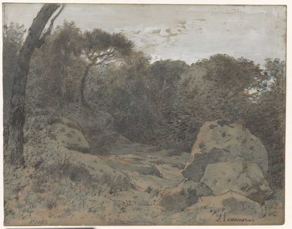 Paisatge de Llavaneres, s/datació. Museu Nacional d'Art de Catalunya. Núm.Registre 26468